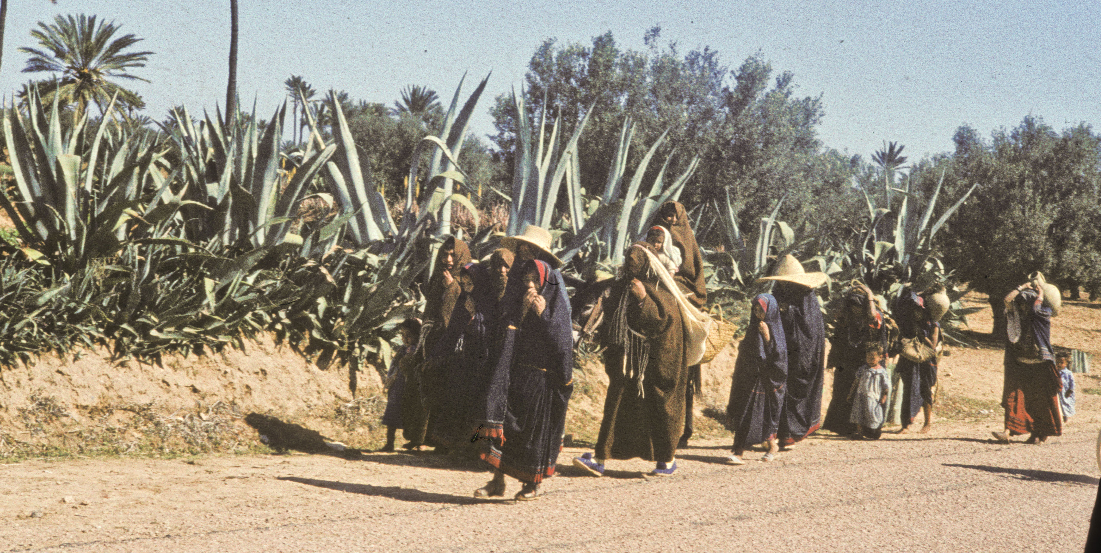 Bringing water, Djerba island, Tunisia